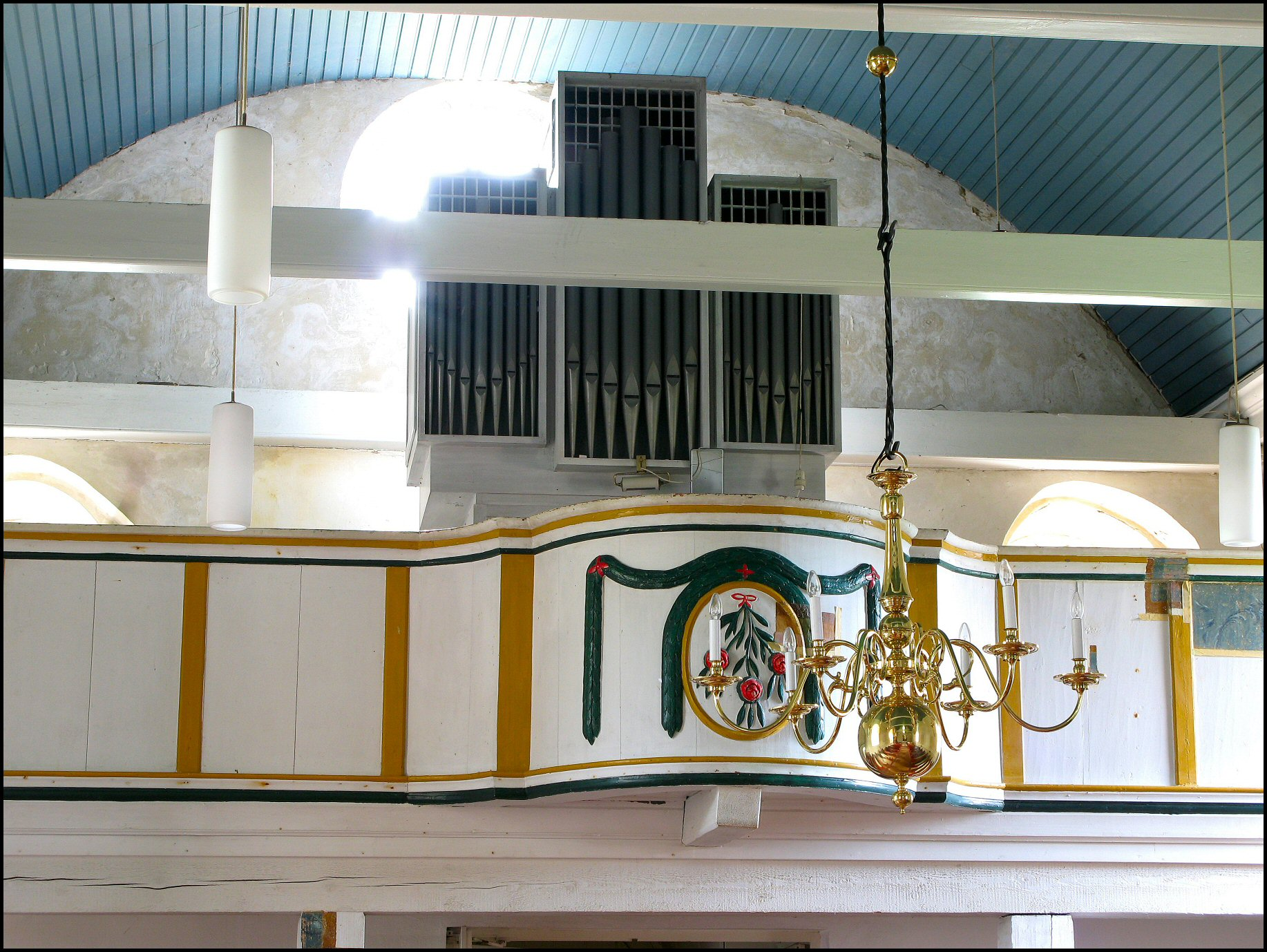 Orgel in Ochtelbur, Landkreis Aurich